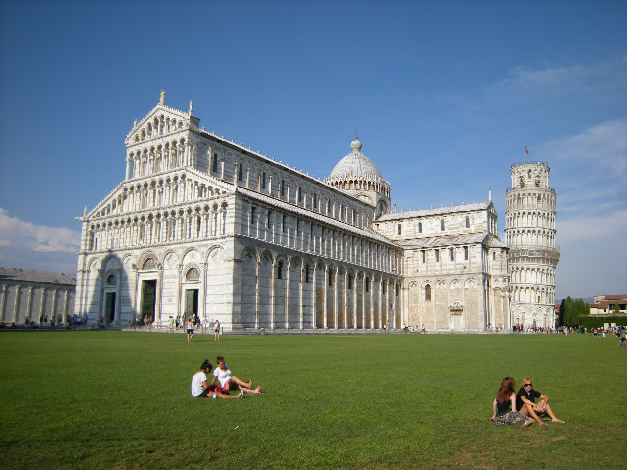 A Catedral, a Torre de Pisa e algumas belas turistas. Nota: em italiano, "prato" = "gramado"